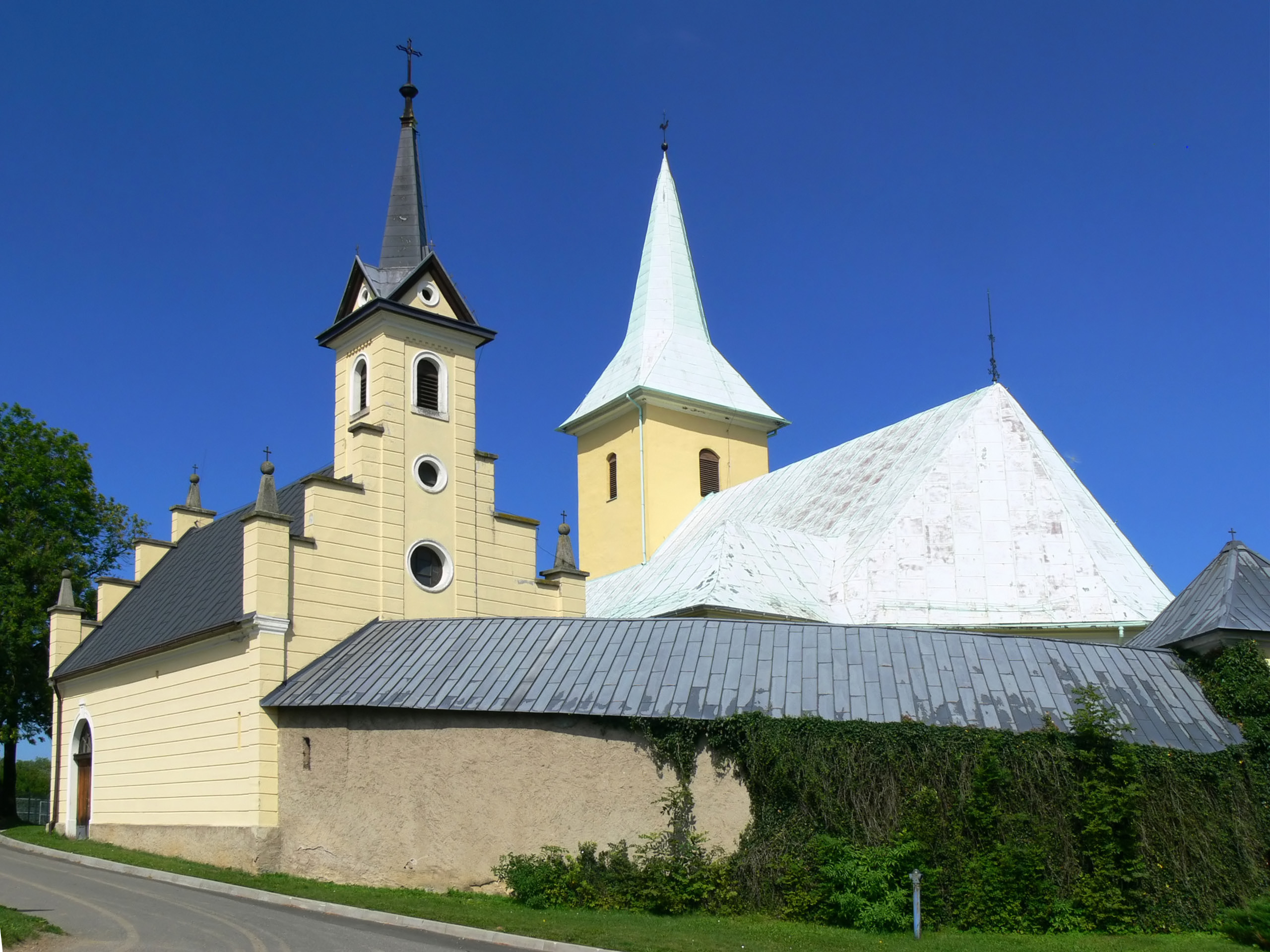 Stary Wielisław - kościół parafialny p.w. św. Katarzyny, XIV-XVIII (zabytek nr A/1666/658)